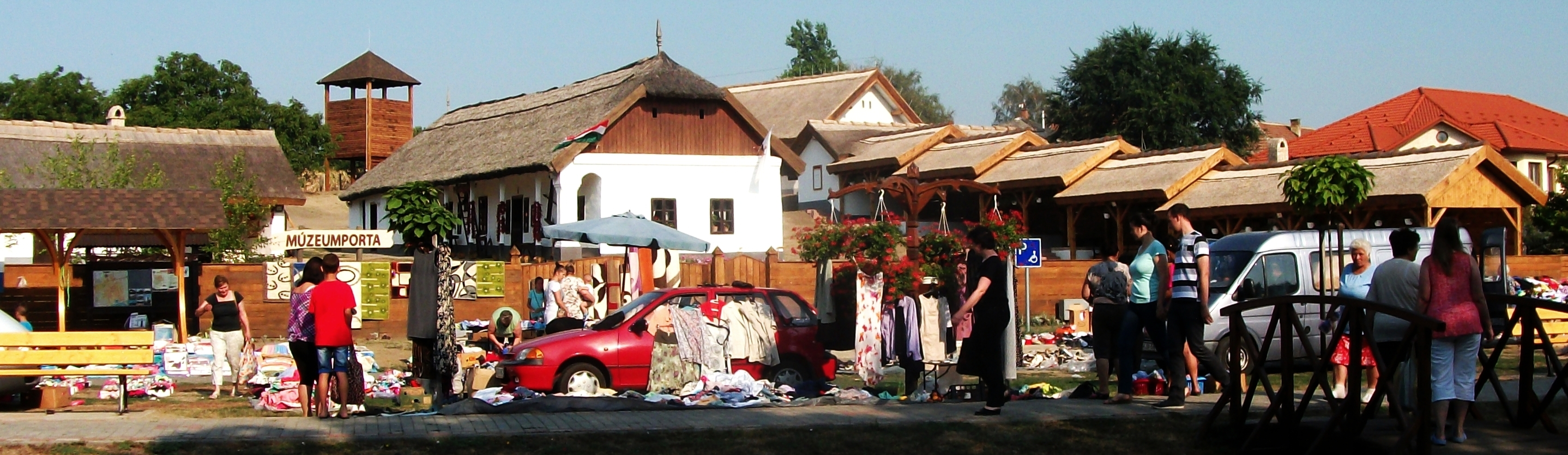 A képen a Bodogközi Múzeumporta látható a főbejárat felől 2015-ben. A kép előterében a cigándi piac.